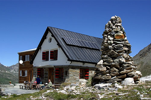 Turtmannhütte SAC - [1]